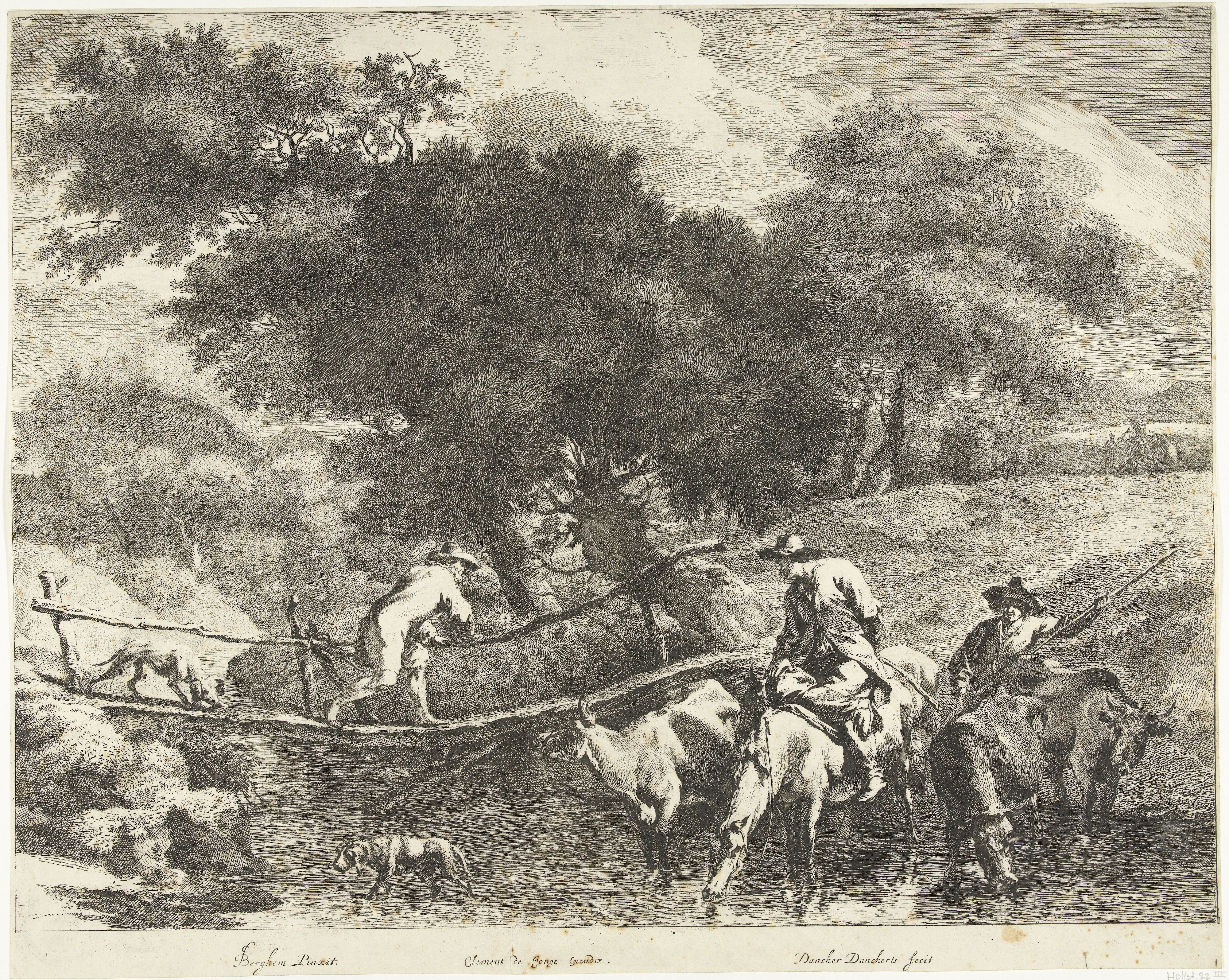 L'homme avec le chien marche sur le pont, un cavalier passe et un berger avec son troupeau de vaches qui boit dans le ruisseau. gravure de Dancker Danckerts d'après une peinture: de Nicolas Berchem.